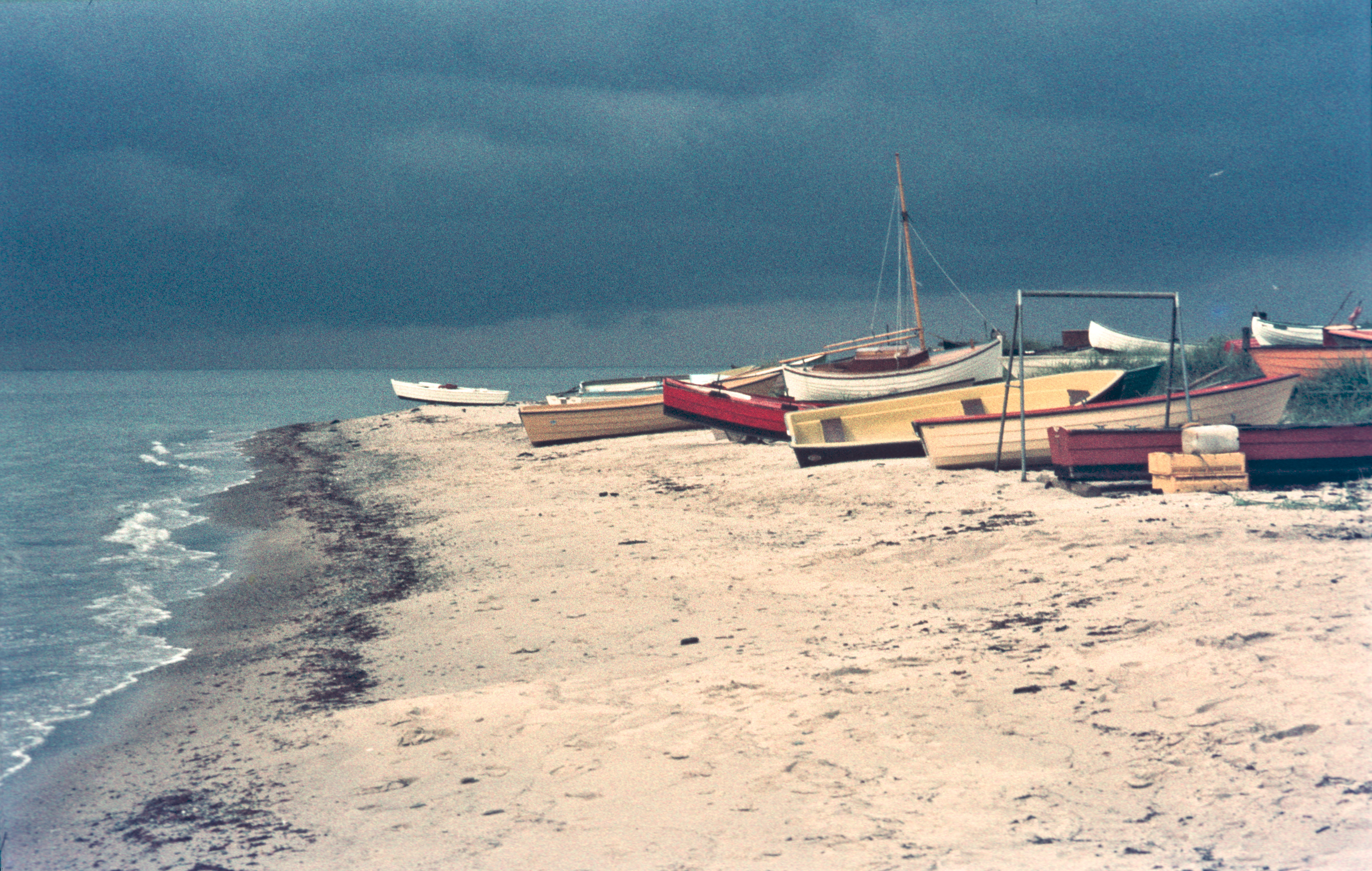 Stranden ved Sorthat-Muleby